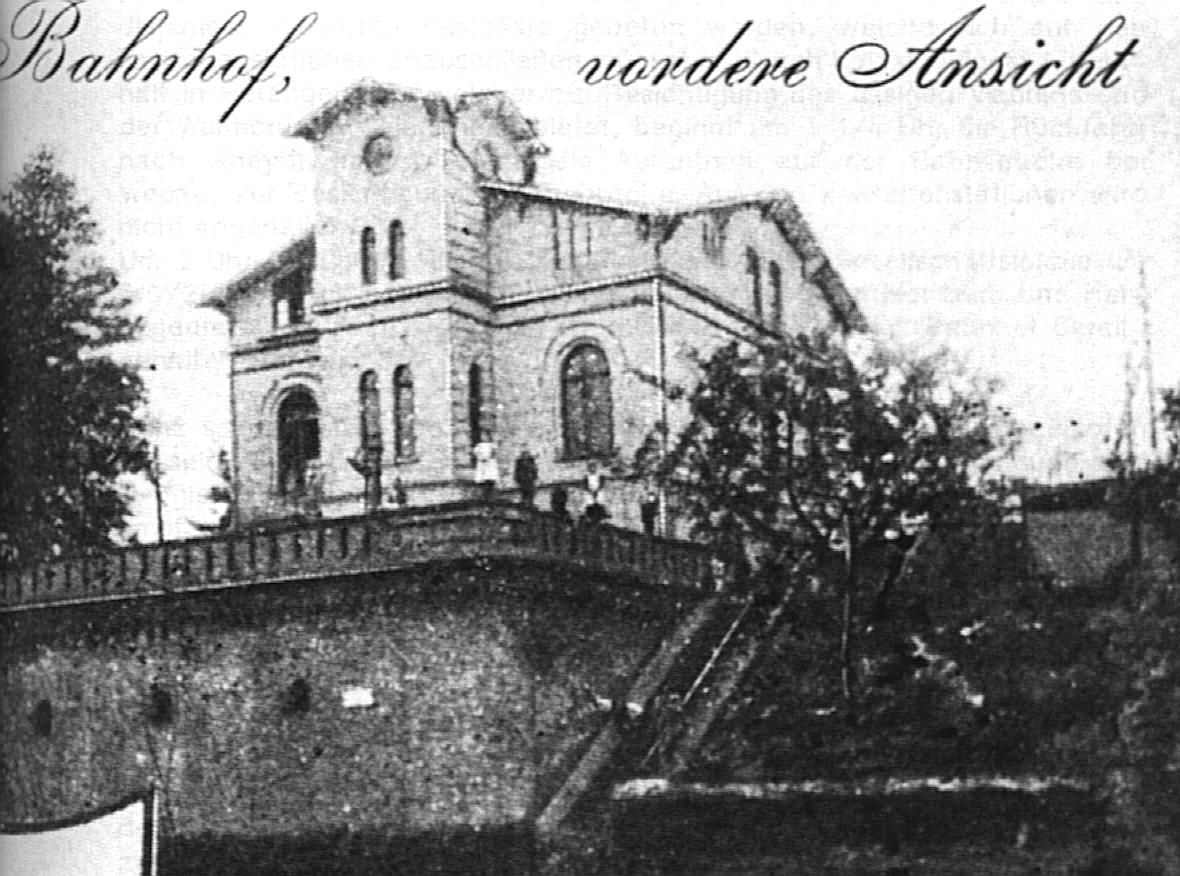 Alter Bahnhof Baal